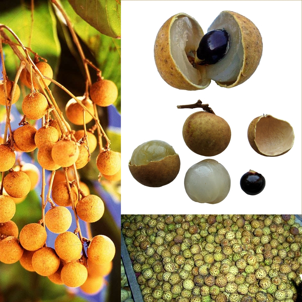 Grafika podręcznika Wikijunior:Owoce. Longan (Dimocarpus longan).